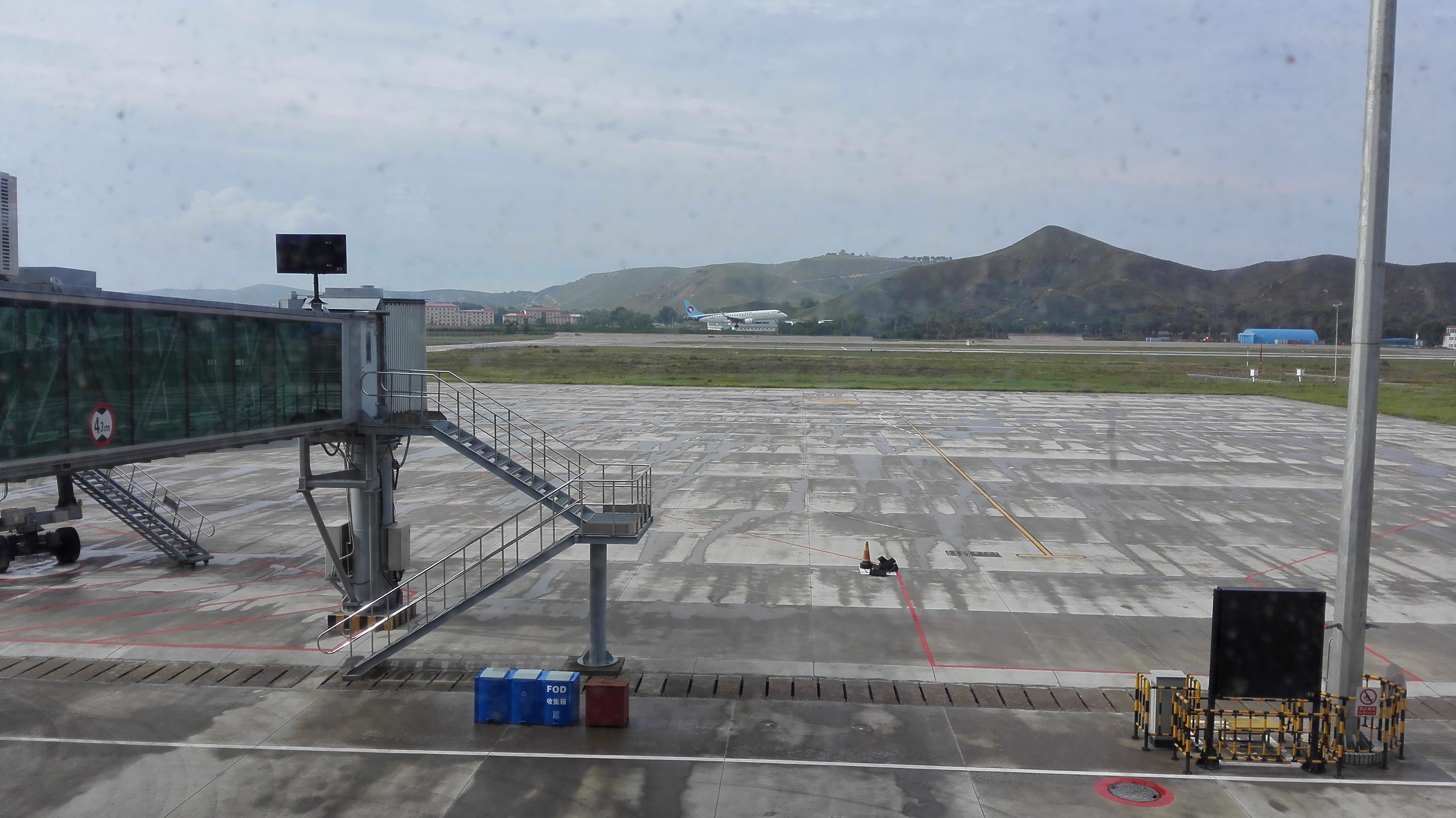 张家口宁远机场跑道，河北航空NS3201航班（Embraer ERJ-190飞机）正在着陆，拍摄于2015年8月31日。